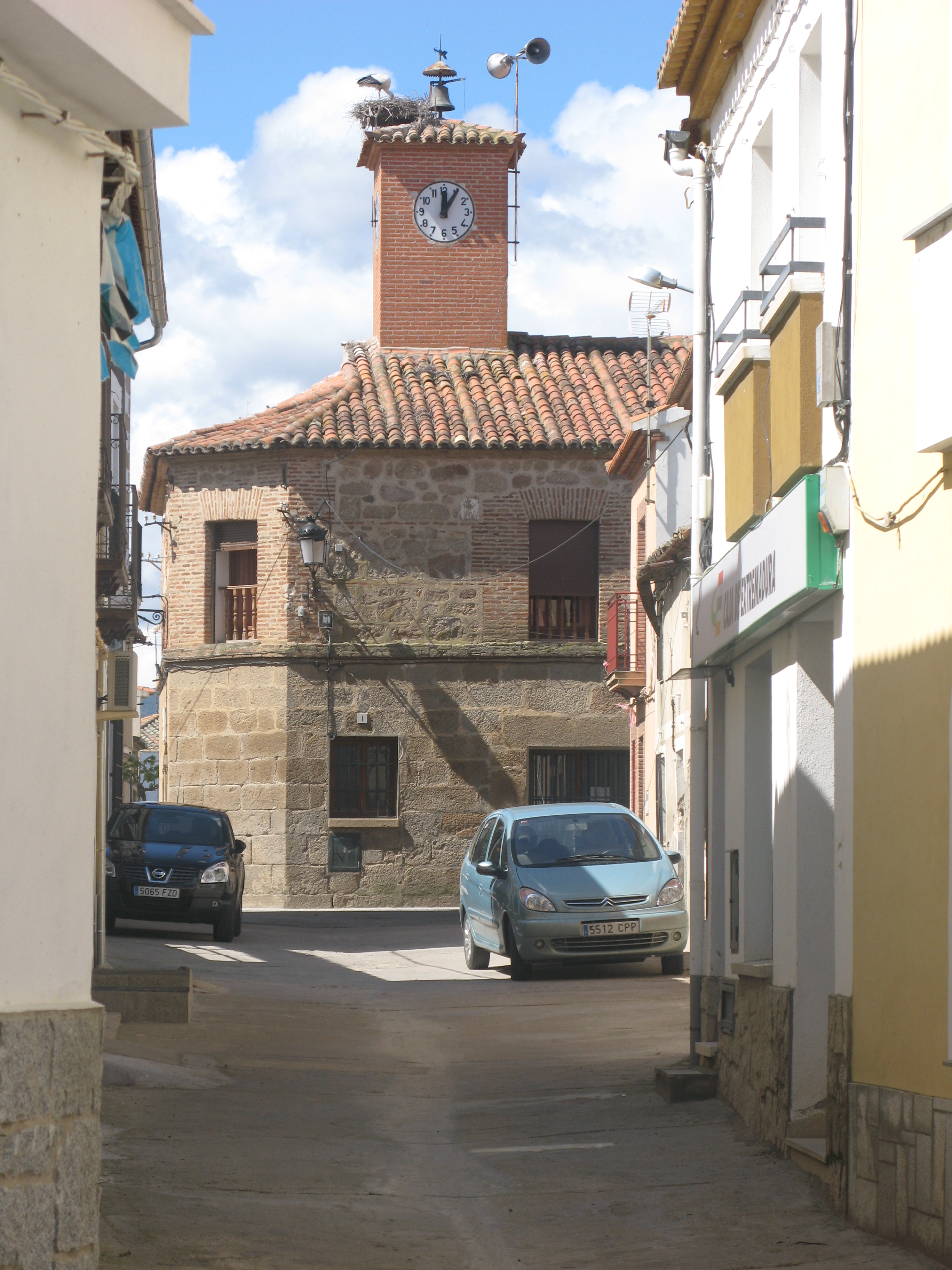 Ayuntamiento de Villar del Pedroso